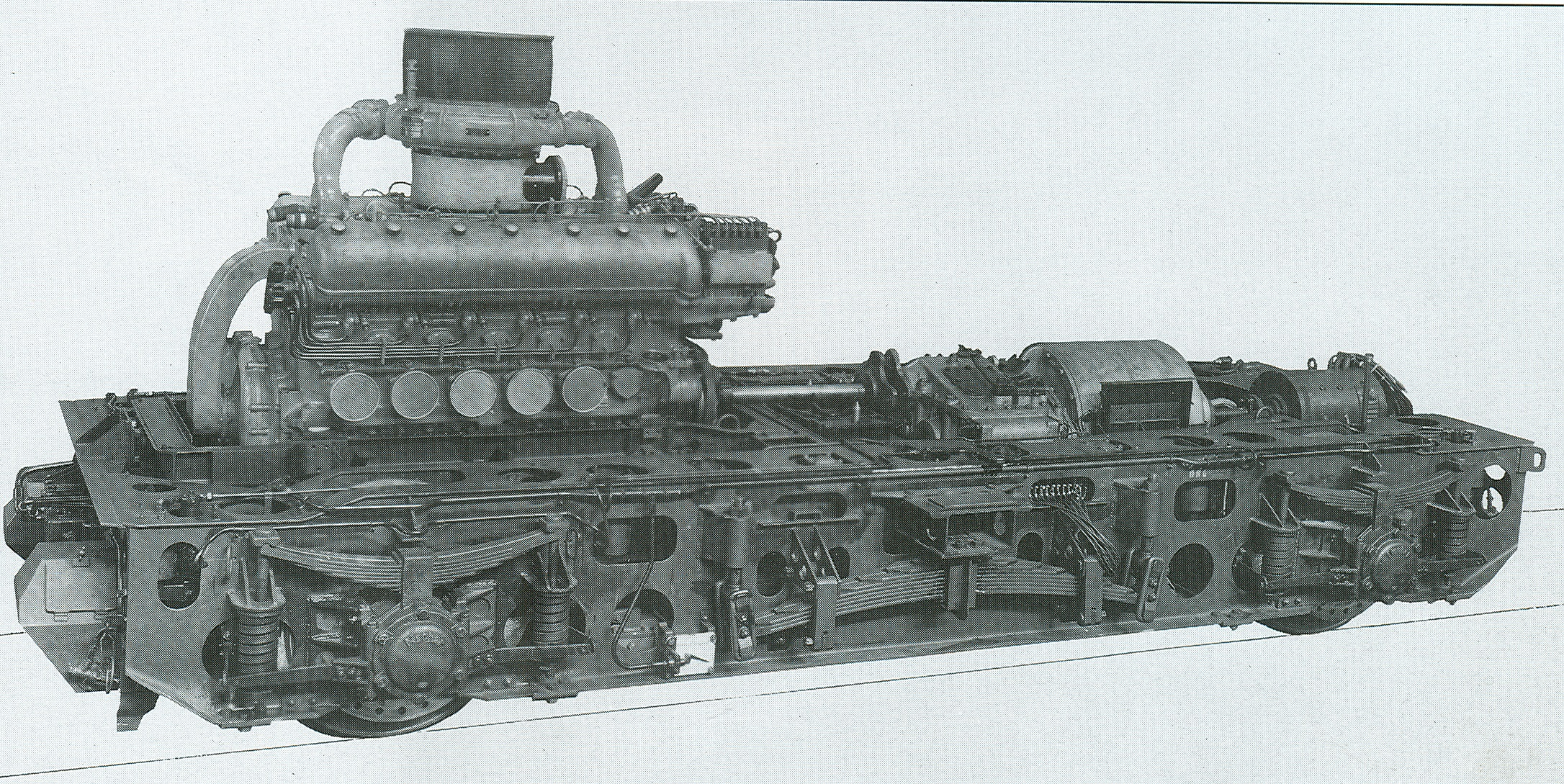 Maschinendrehgestell des SVT Leipzig mit hydrodynamischer Kraftübertragung auf einer Werksaufnahme von Voith